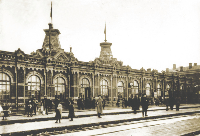 Віленскі вакзал